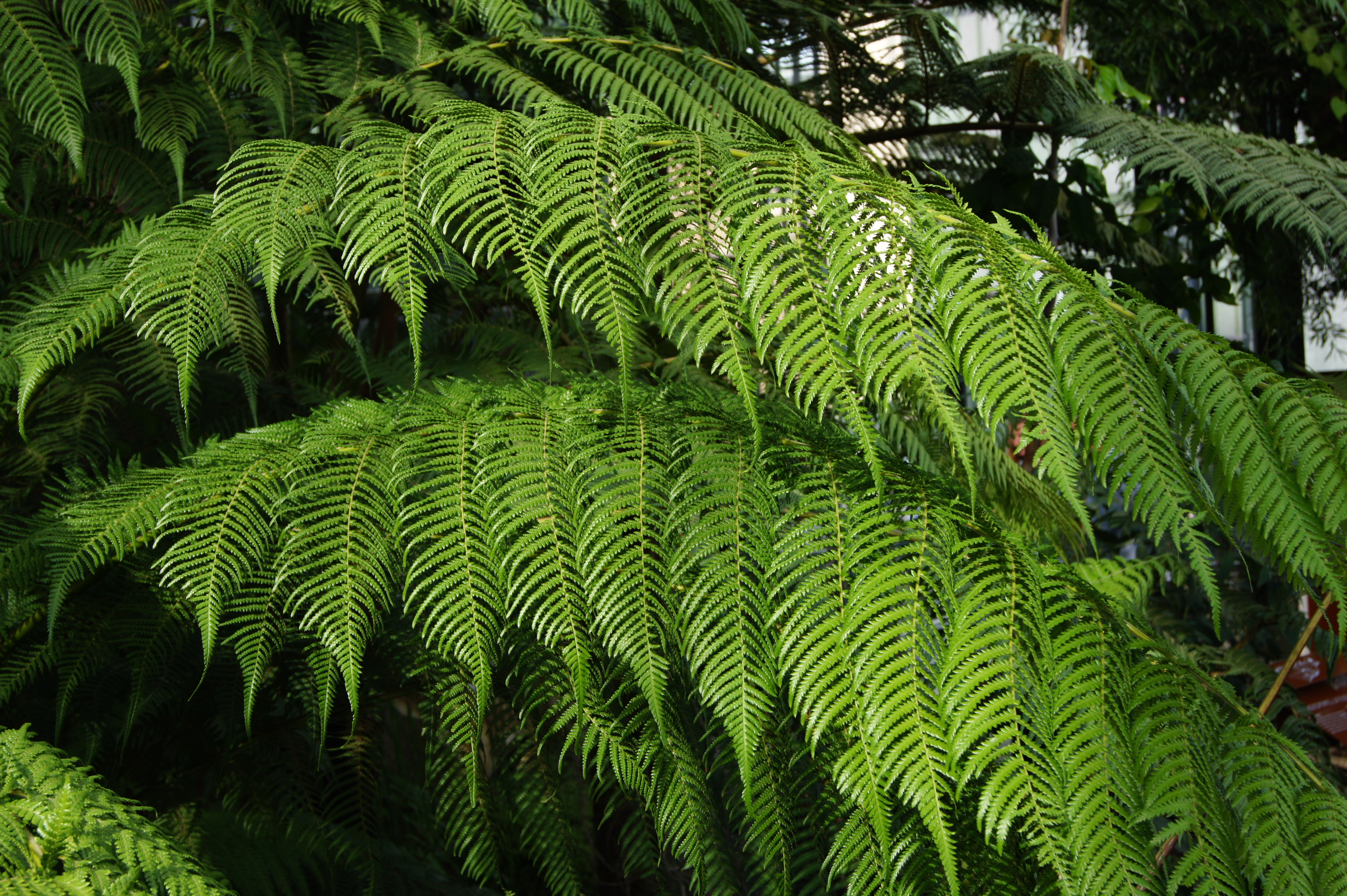 Cyathea dregei Kunze, Serre tropicale du Jardin des Plantes de Paris